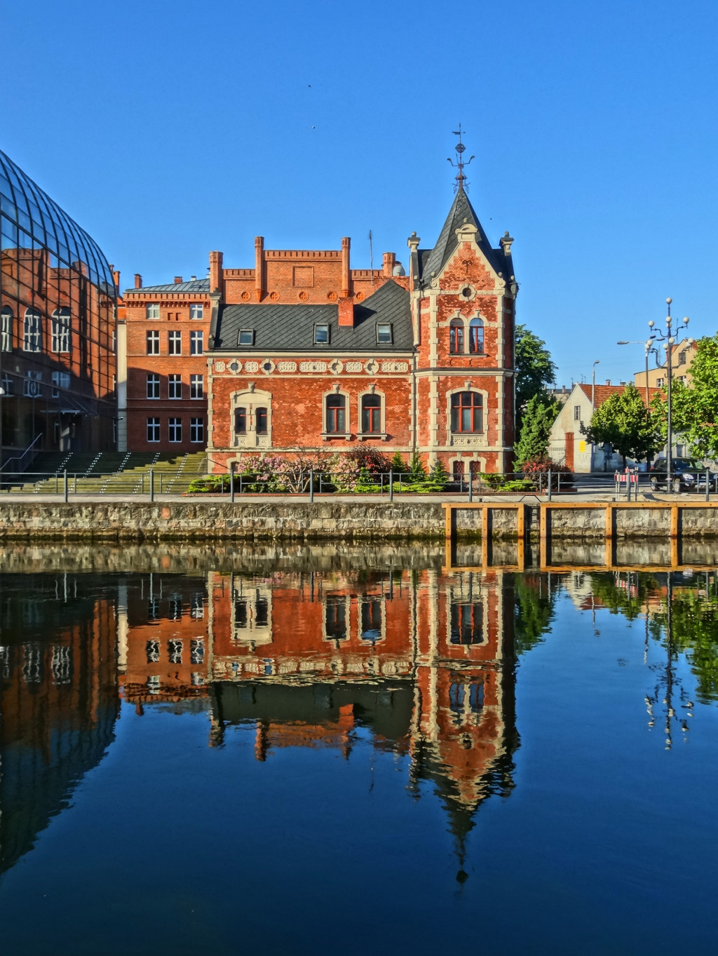 Pałacyk Lloyda w Bydgoszczy (zbud. 1886), dawna siedziba przedsiębiorstw żeglugowych, położony w strefie staromiejskiej nad Brdą.